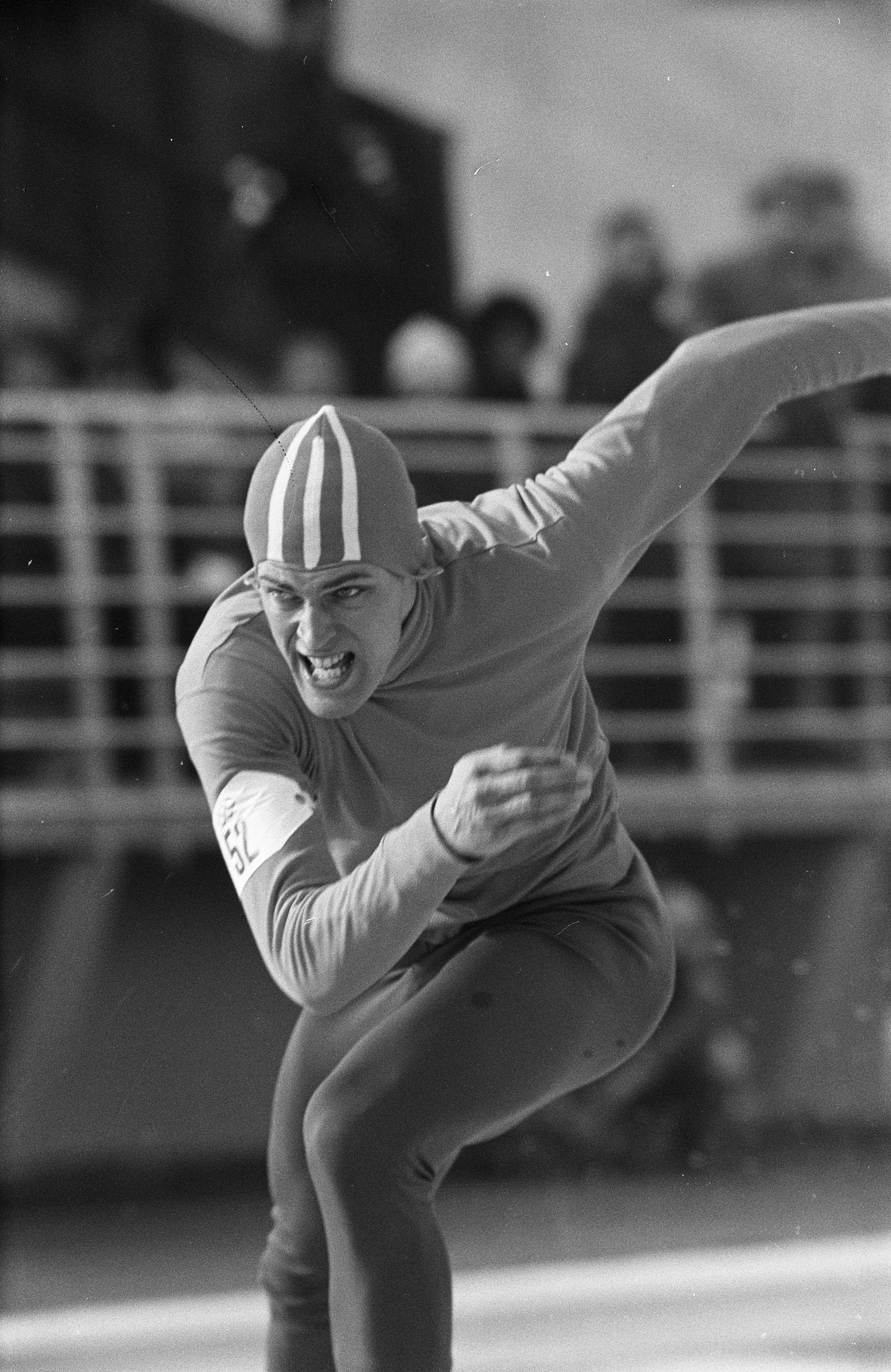 Olympische Spelen Grenoble, Ard Schenk in aktie. Datum 15 februari 1968